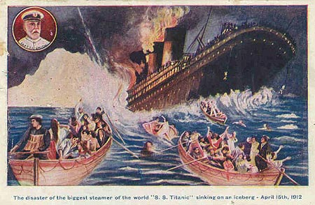 1912年にタイタニック沈没事件に合わせて作られた絵葉書 沈没の絵と救命ボートで逃げる様子が描かれている